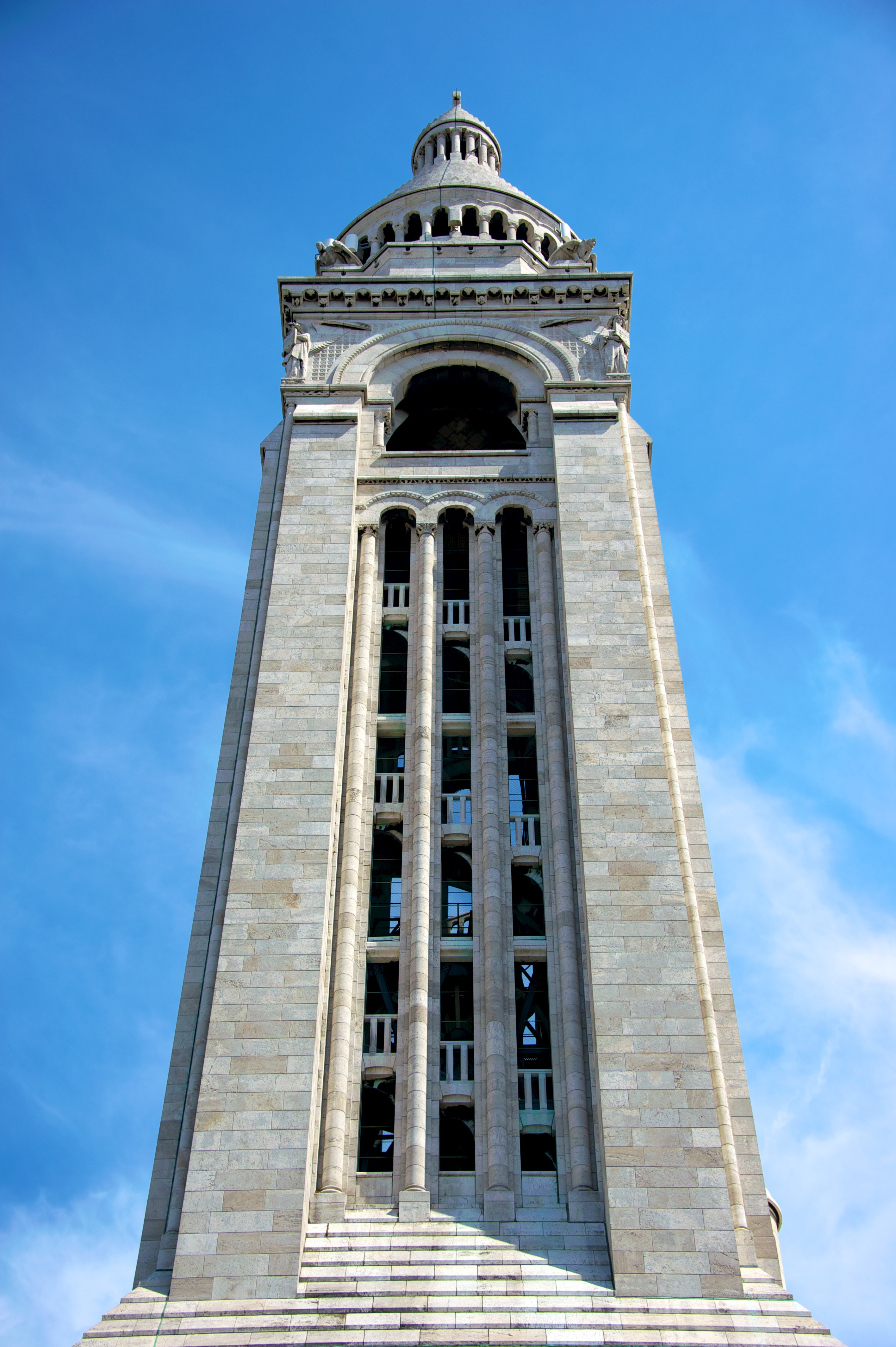 Tour du Sacré Cœur, Montmartre, Paris